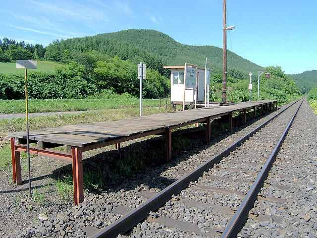 駅全体 撮影場所 新栄野駅近くの築堤 撮影者によるGFDLリリース